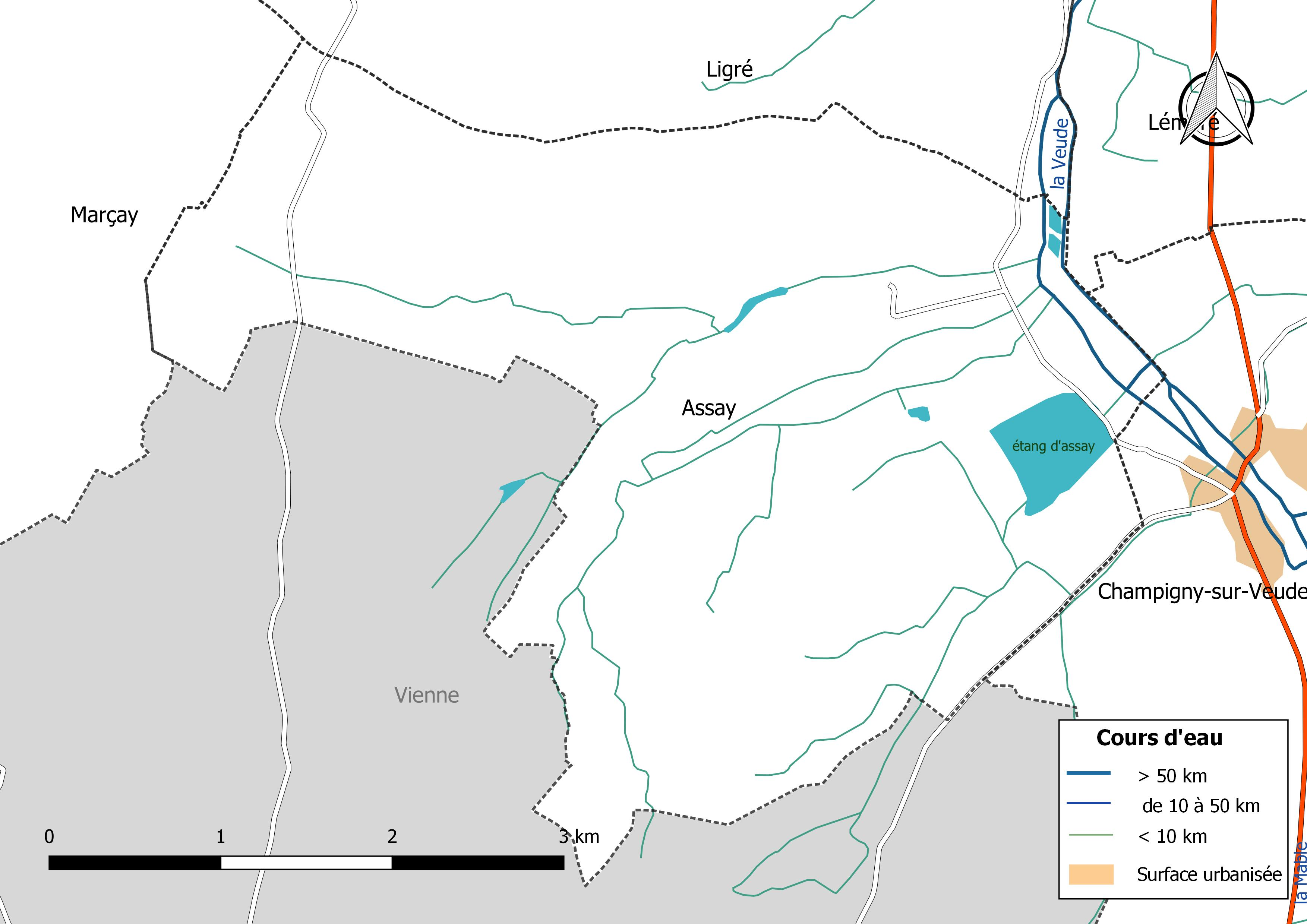 Carte du réseau hydrographique de la commune de Assay (France).